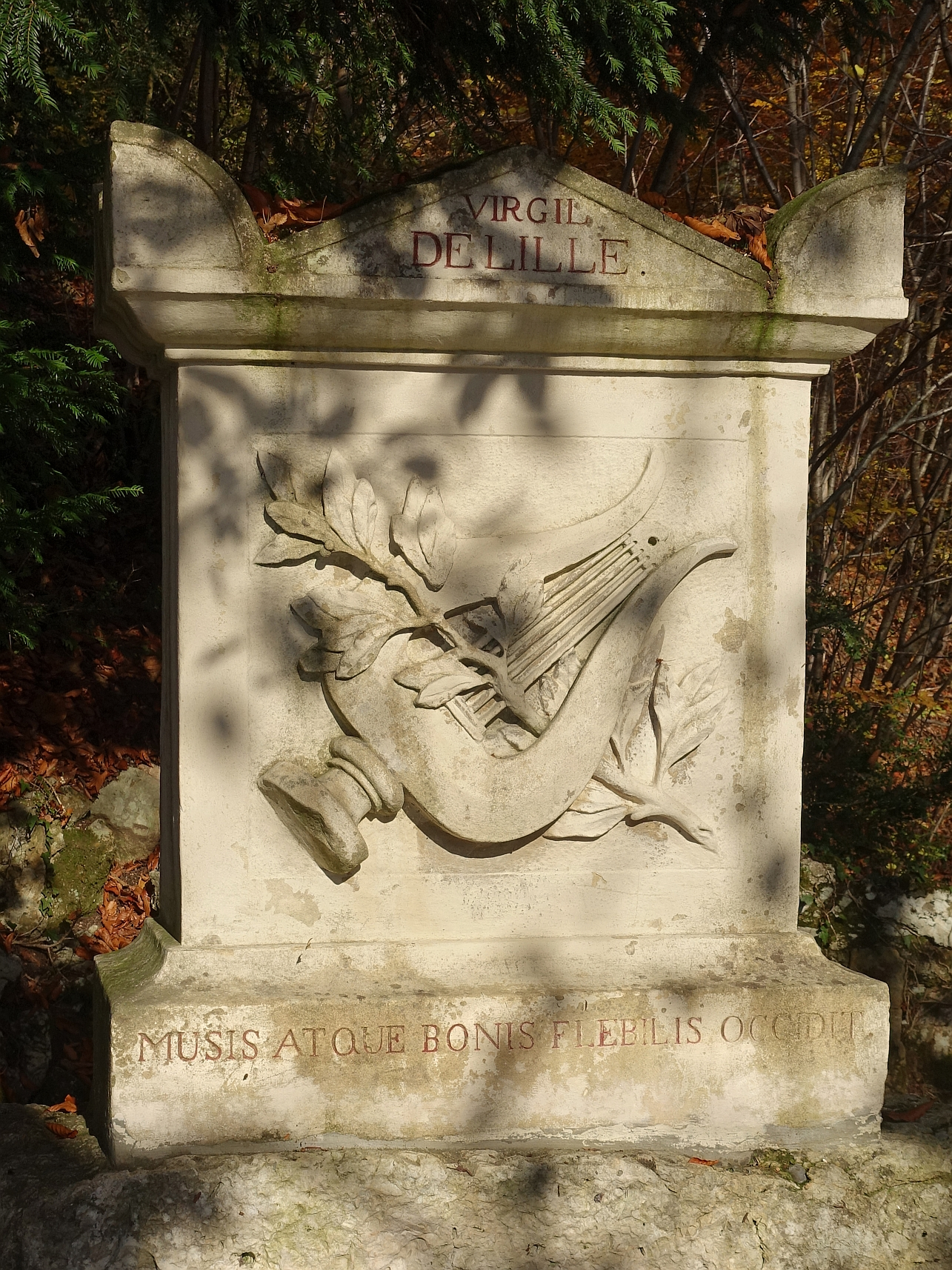 Das Denkmal mit der Innschrift: Er starb von den Musen und allen Guten beweint von 1814 ist dem französischen Übersetzer Virgils, Jacques Delille (1738 – 1823) gewidmet, der 1782 das Lehrgedicht „Les Jardins “ (Die Gärten) publiziert.